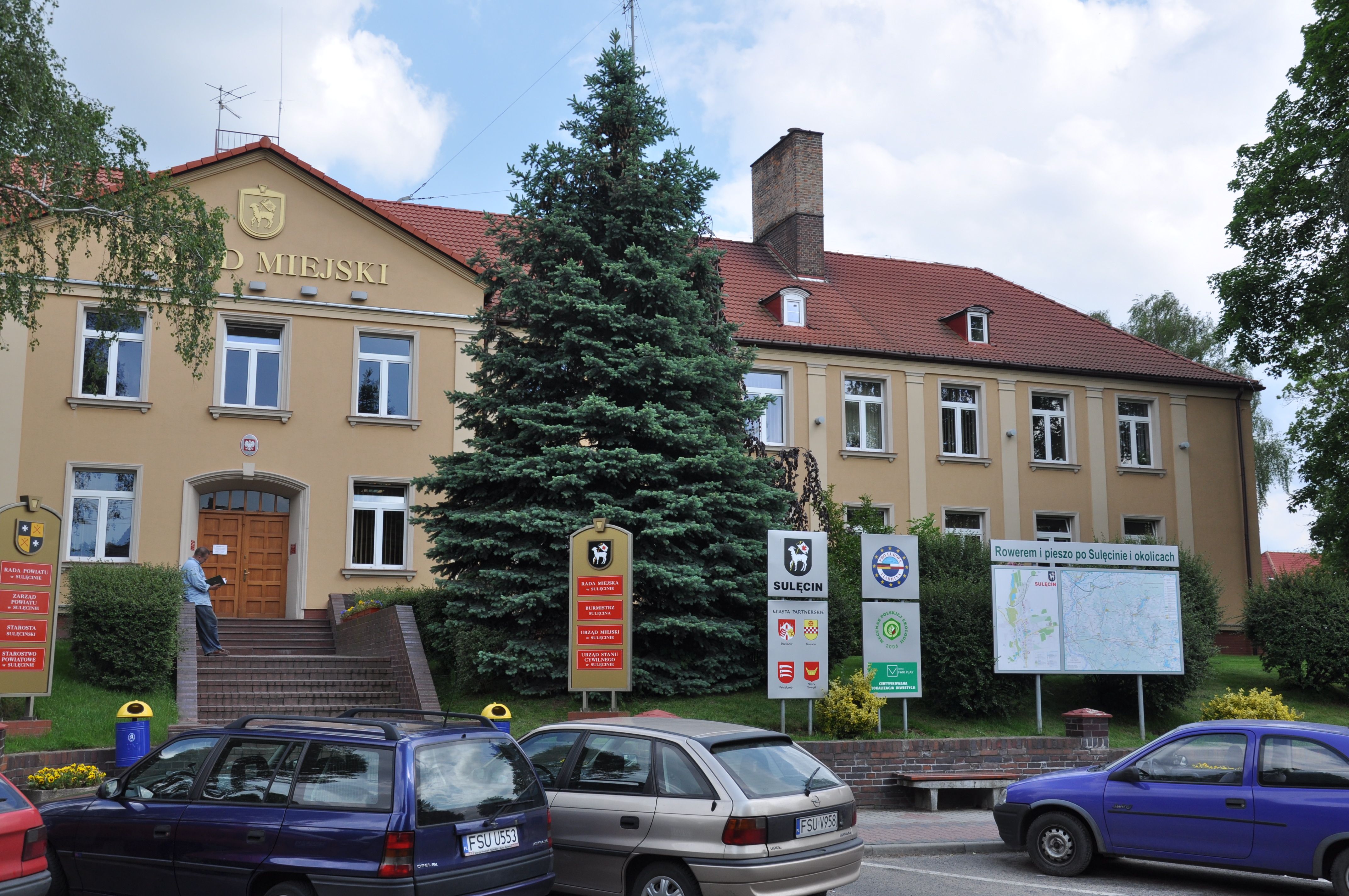 dawne koszary w Sulęcinie. 2010 - Urząd Miejski